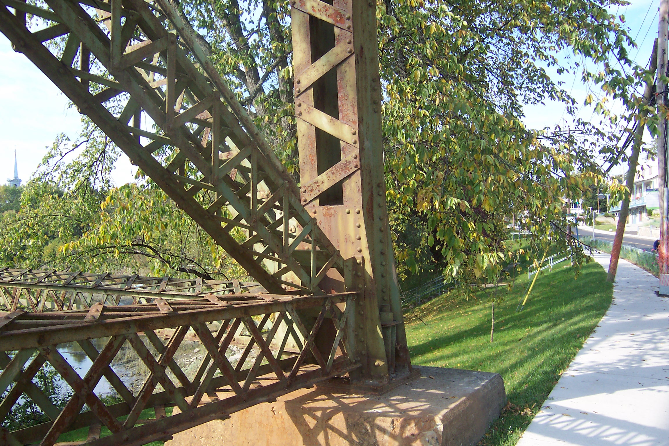 Détail de la base d'un pilier du Tracel de Cap-Rouge près de la Côte de Cap-Rouge.